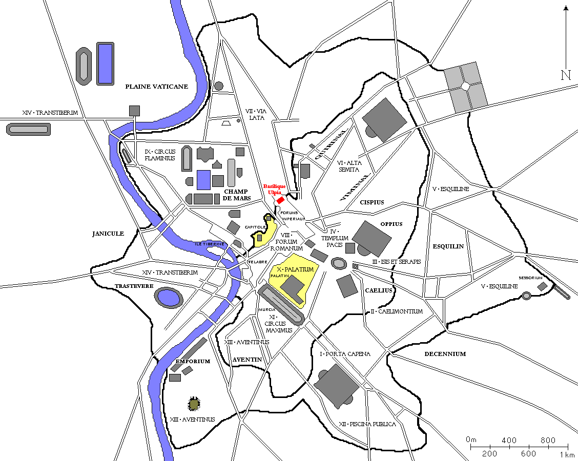 Plan de Rome redessiné à partir de diverses sources. Tous les bâtiments importants construits jusqu'à la fin de l'Empire romain sont dessinés, ainsi que les régions d'Auguste et les collines de Rome. Auteur : ColdEel En rouge, la Basilique Ulpia